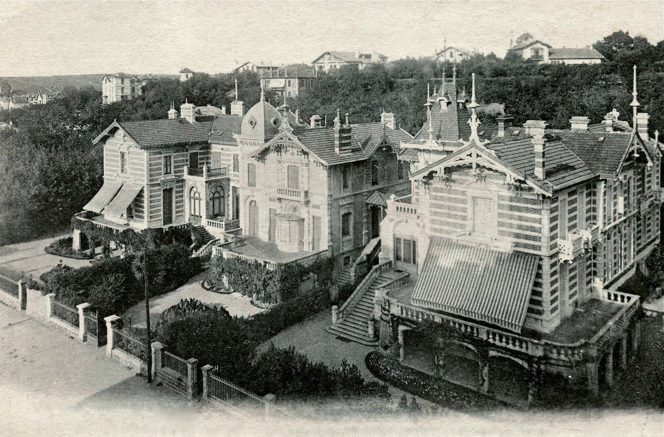 De izquierda a derecha: Villa Arbelaiz (propiedad de Tirso de Olazábal, conde de Arbelaiz), Villa Itchola (propiedad de Ramón de Olazábal y Álvarez de Eulate) y Villa Eguskitza (propiedad de Graziela Zileri del Verme degli Obbizi, duquesa de Cadaval). Saint-Jean-de-Luz, Francia.